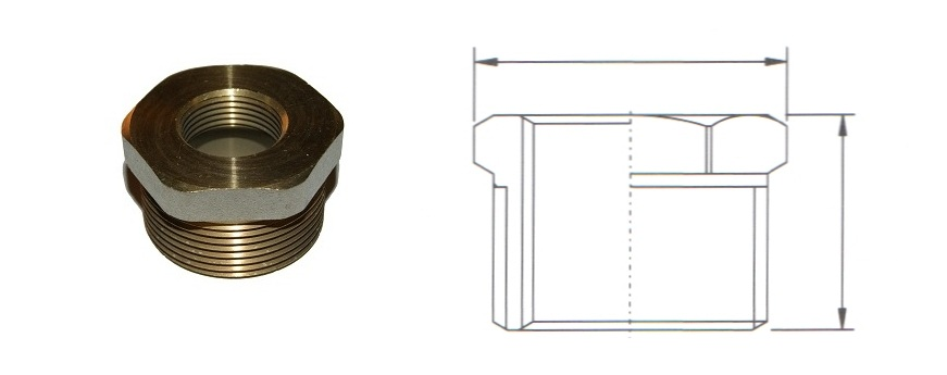 Футорка представляет собой соединение трубопровода для перехода с одного размера на другой.